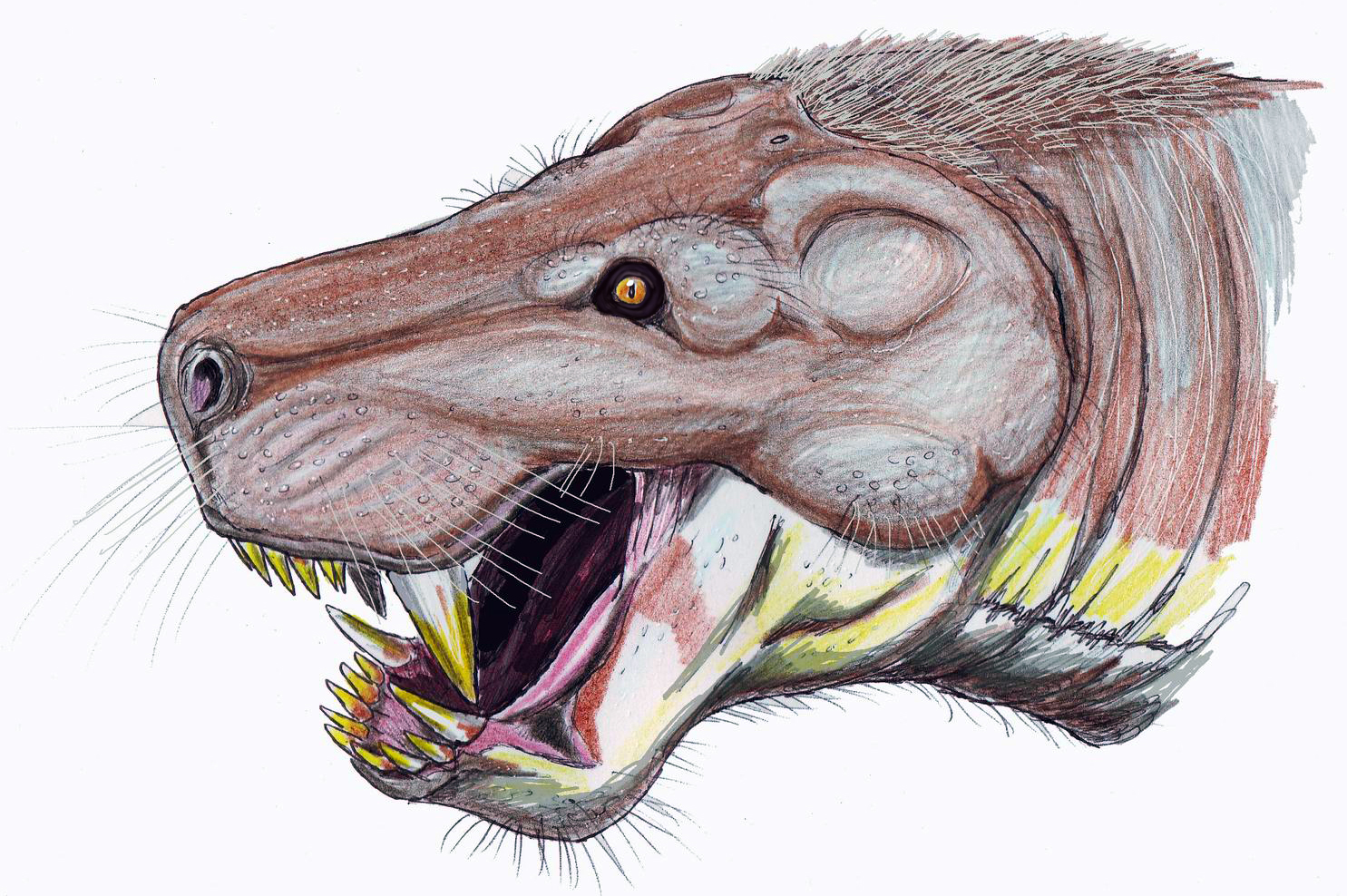 Clelandina rubigei